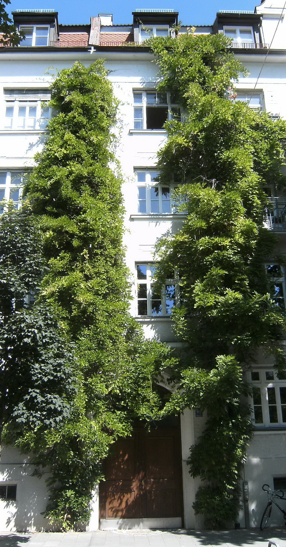 Kletterpflanze an einer Fassade in München Sendling